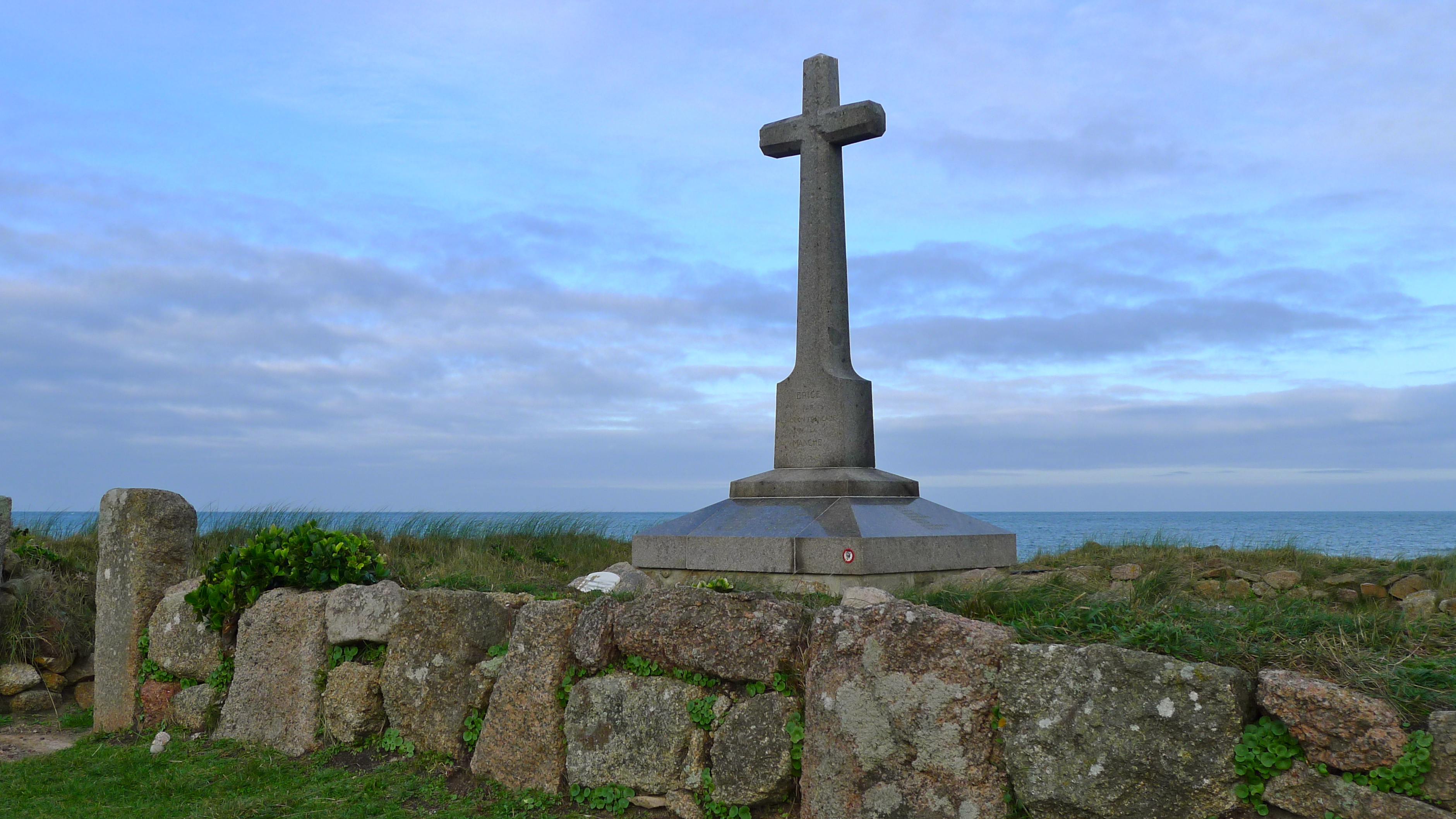 Croix en souvenir du naufrage du sous-marin Prométhée le 7 juillet 1932. Pointe de Fréval, Fermanville, Basse-Normandie, France.